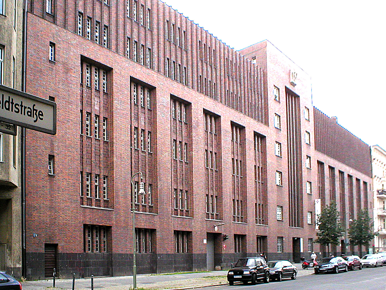 Berlin, Schöneberg-Tempelhof, Schöneberg, Fernmeldeamt 1, Winterfeldtstraße 19-23.